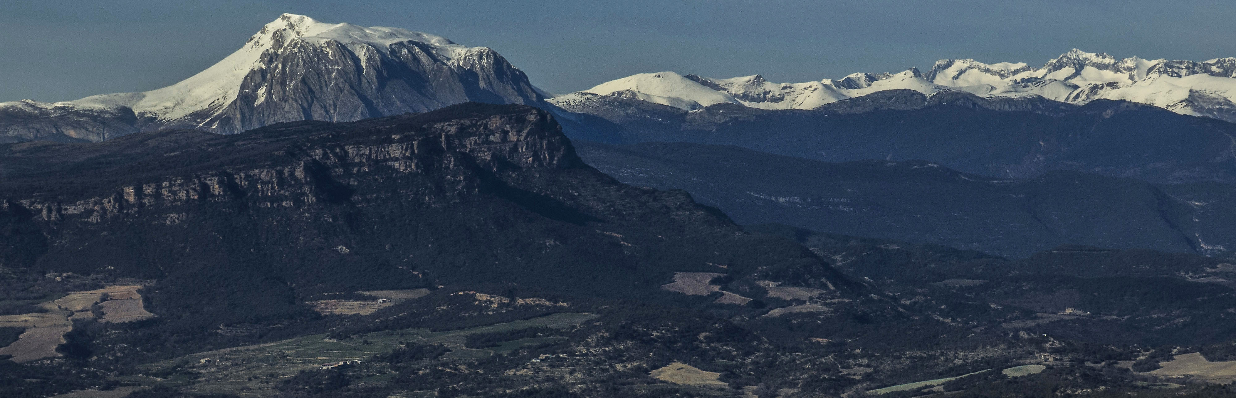 Imatge del Turbó, el Morrón de Güel, la vall de l'Isàvena, la serra del Jordal i part del Pirineu aragonés. Fotografia feta des de la serra del castell de Llaguarres, que està situada a la Baixa Ribagorça.